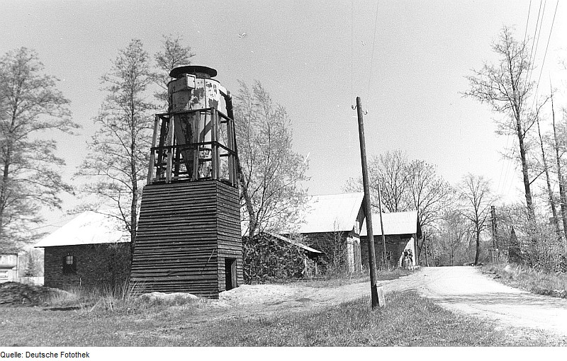 Original image description from the Deutsche Fotothek Hähnichen-Quolsdorf. Ehem. Wassermühle im sog. Hinterdorf, jetzt Sägewerk Herzig